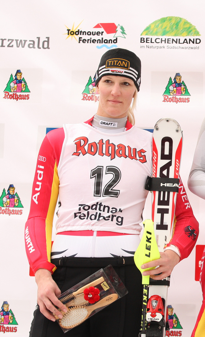 Susanne Riesch (Teil von File:100320 bl dm bl 010.JPG)